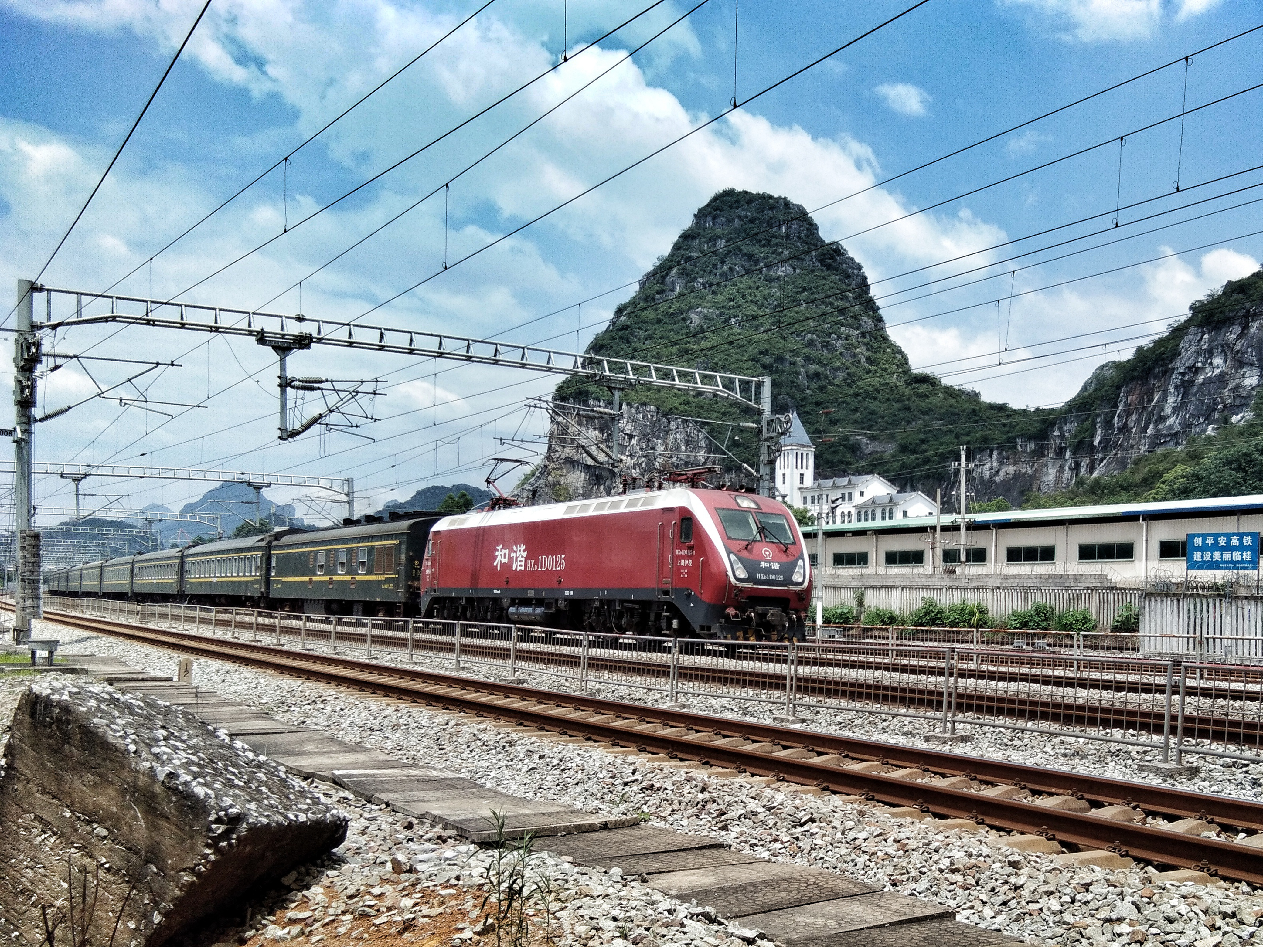 0125号和谐1D型电力机车牵引T25次列车进入桂林市二塘站